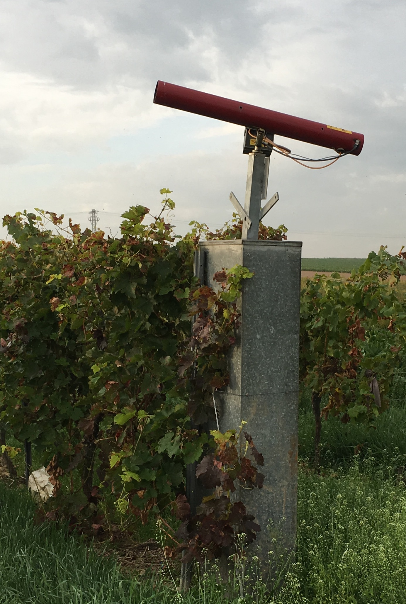 Schussaparat zur Vogelabwehr im Weinberg